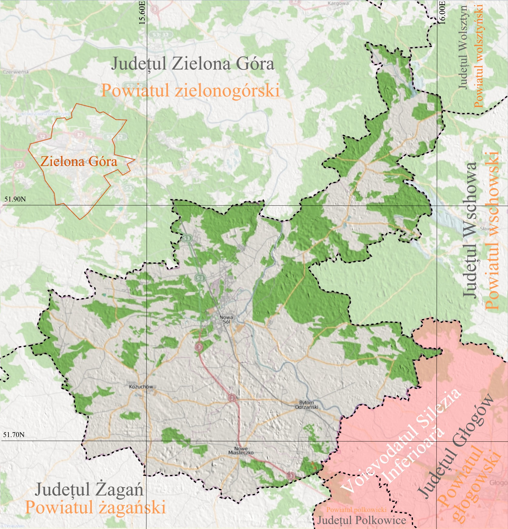 Harta de localizare a Judeţului Nowa Sol din Voievodatul Poloniei, Lubusz. Coordonate: Top: 52.075 Bottom: 51.625 Left: 15.40 Right: 16.10